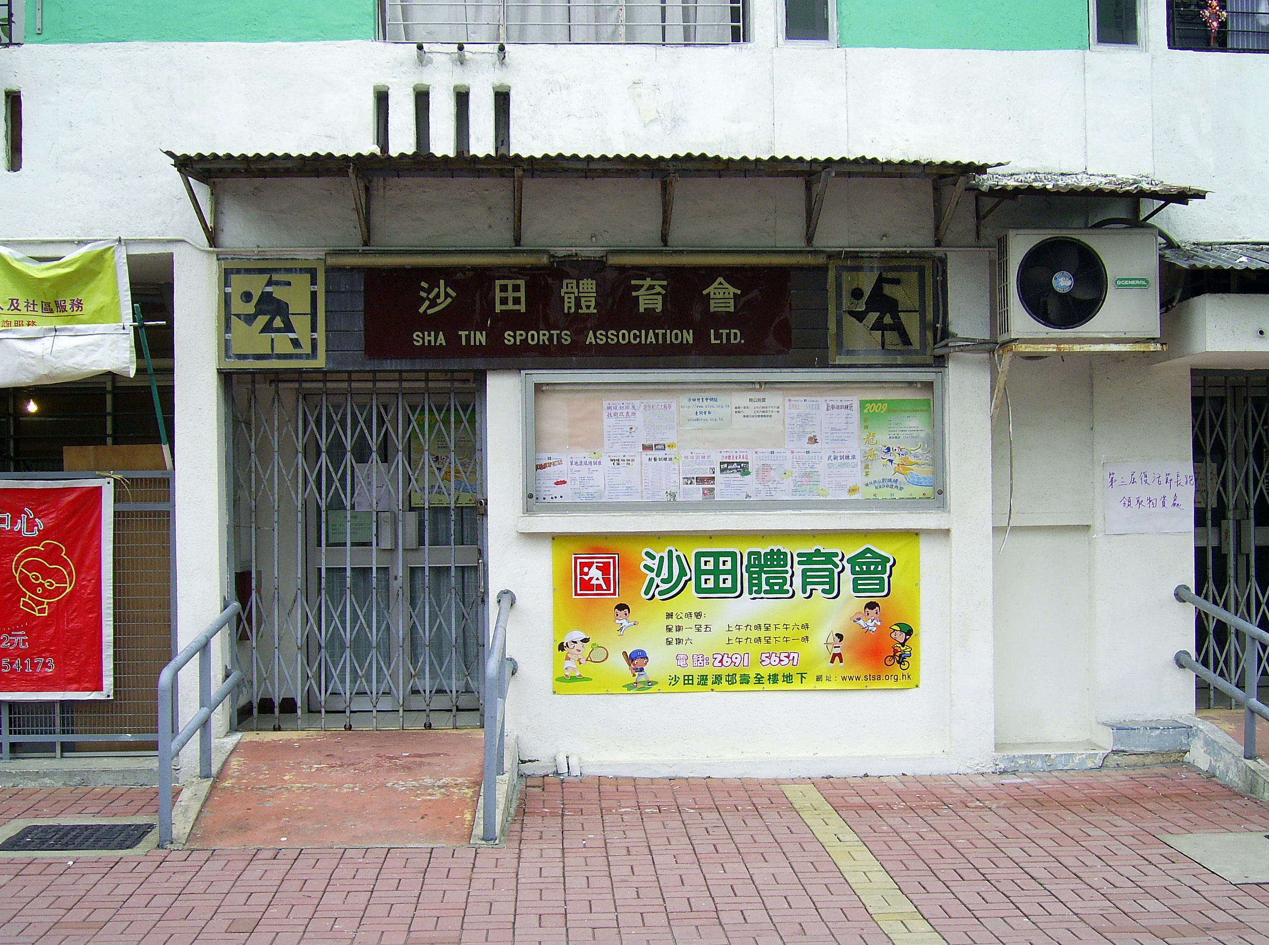 中文（香港）: 位於瀝源邨壽全樓地下的沙田體育會會址